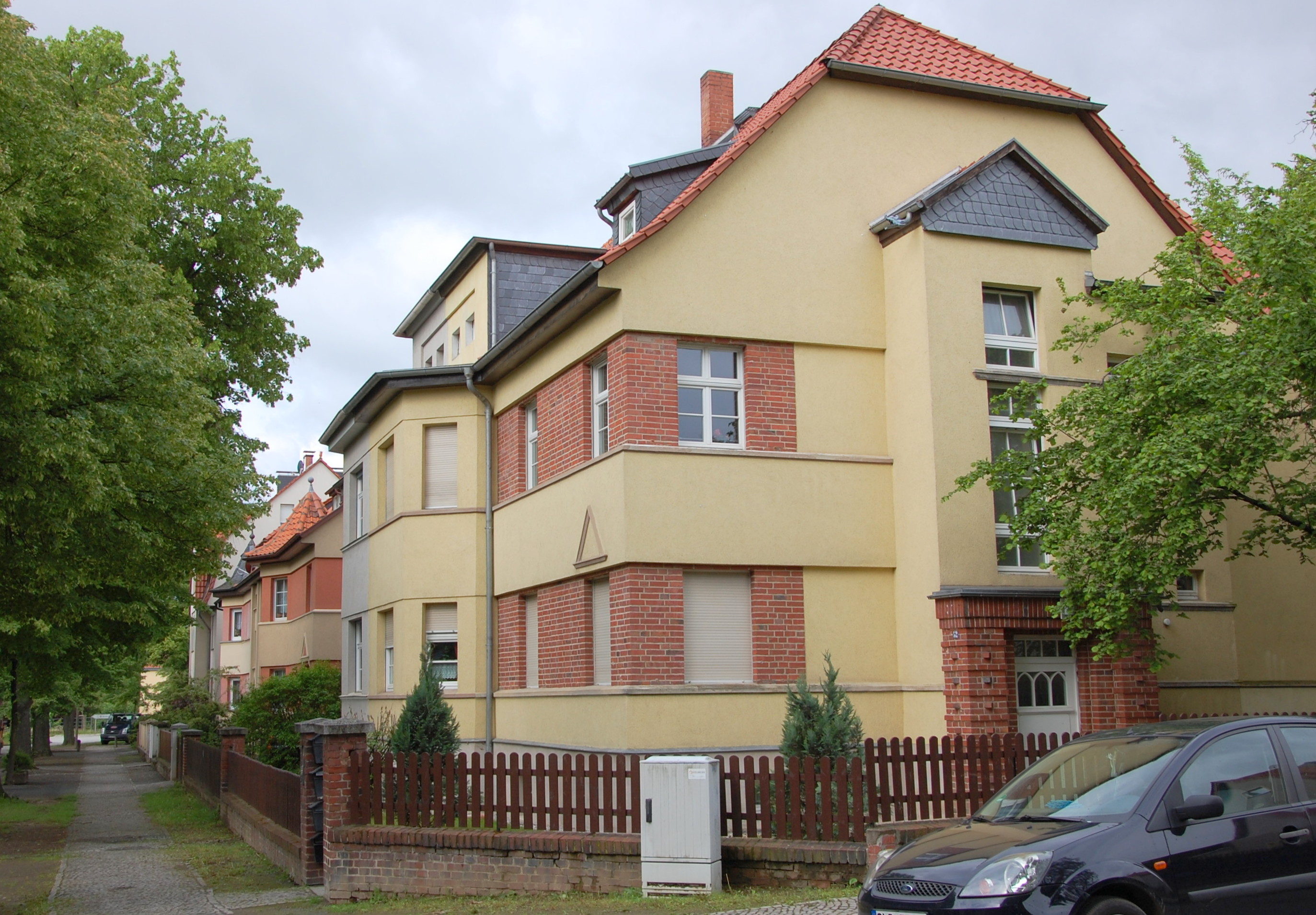 Haus Wallstraße 48-52 in Quedlinburg